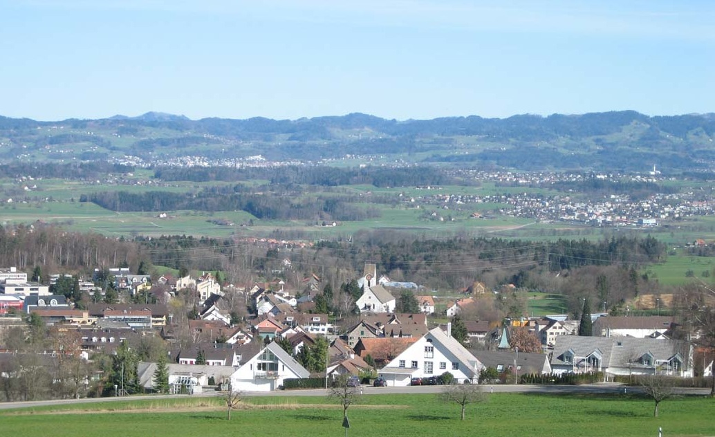 Egg